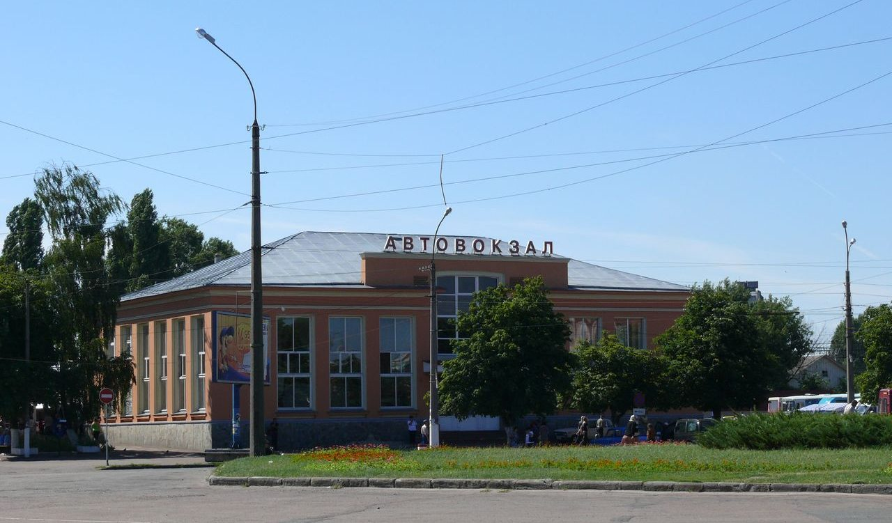 Автовокзал города Чернигова "Чернигов 1". Расположен на Вокзальной площади рядом с железнодорожным вокзалом.